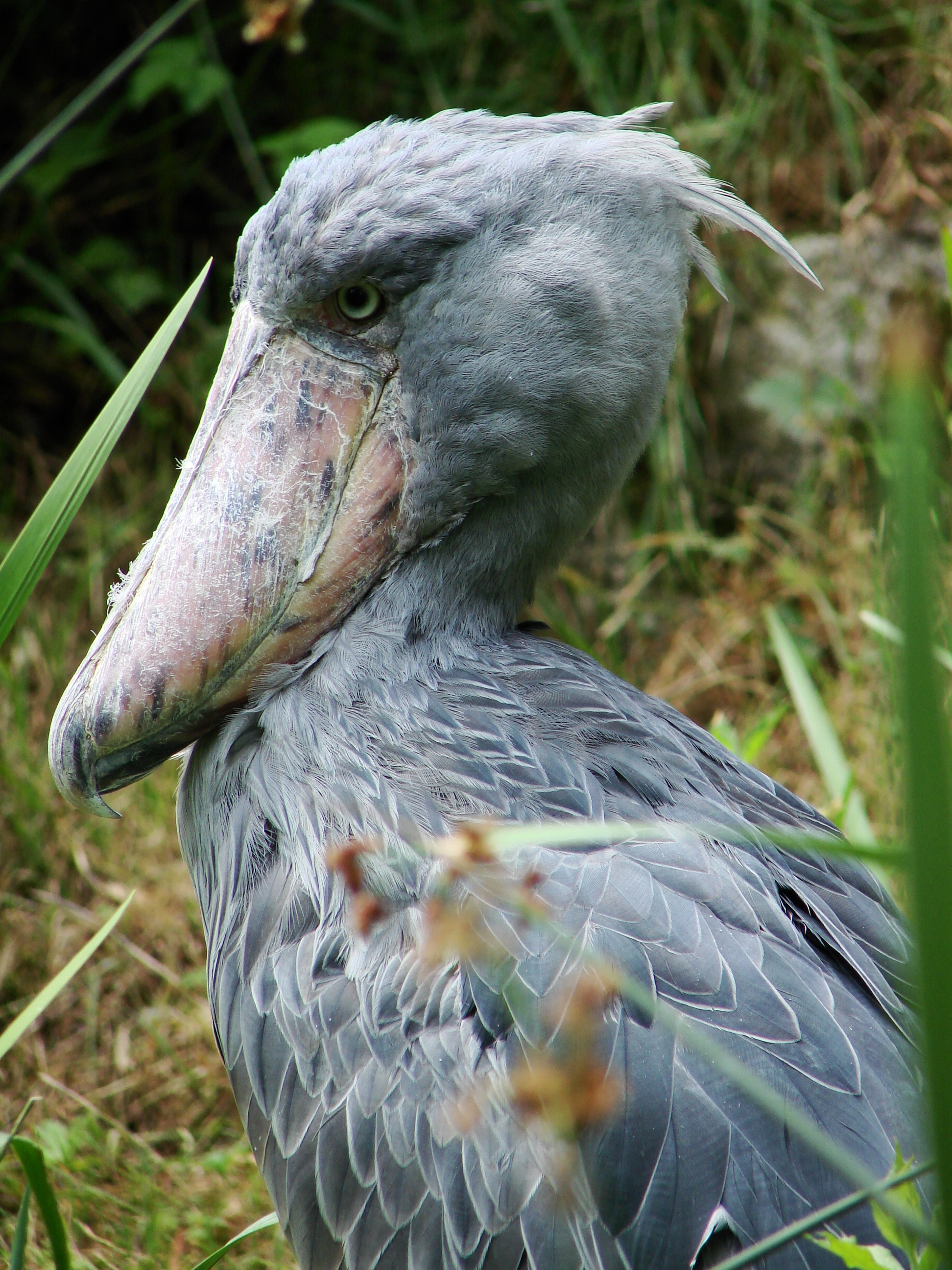 bec-en-sabot du Nil (Balaeniceps rex)